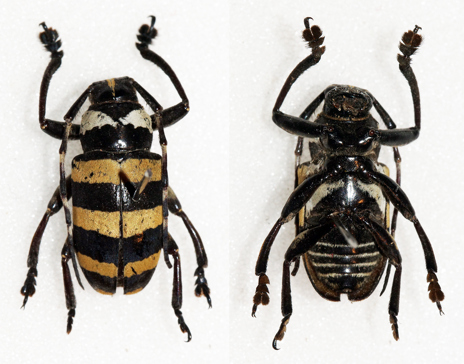 Newman,1842 Sex: Male Data: 04-2012 - Surigao - Philippines Size: 15mm